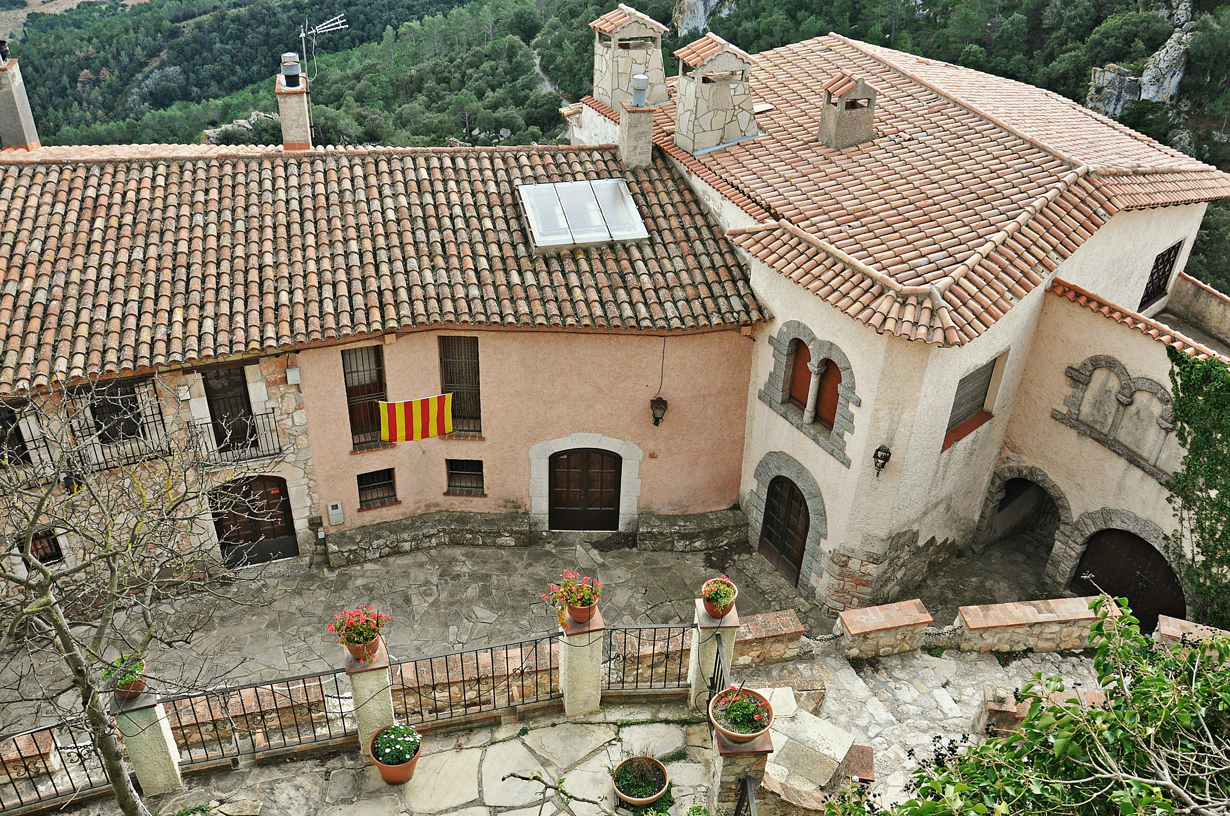 alt camp-cataluña